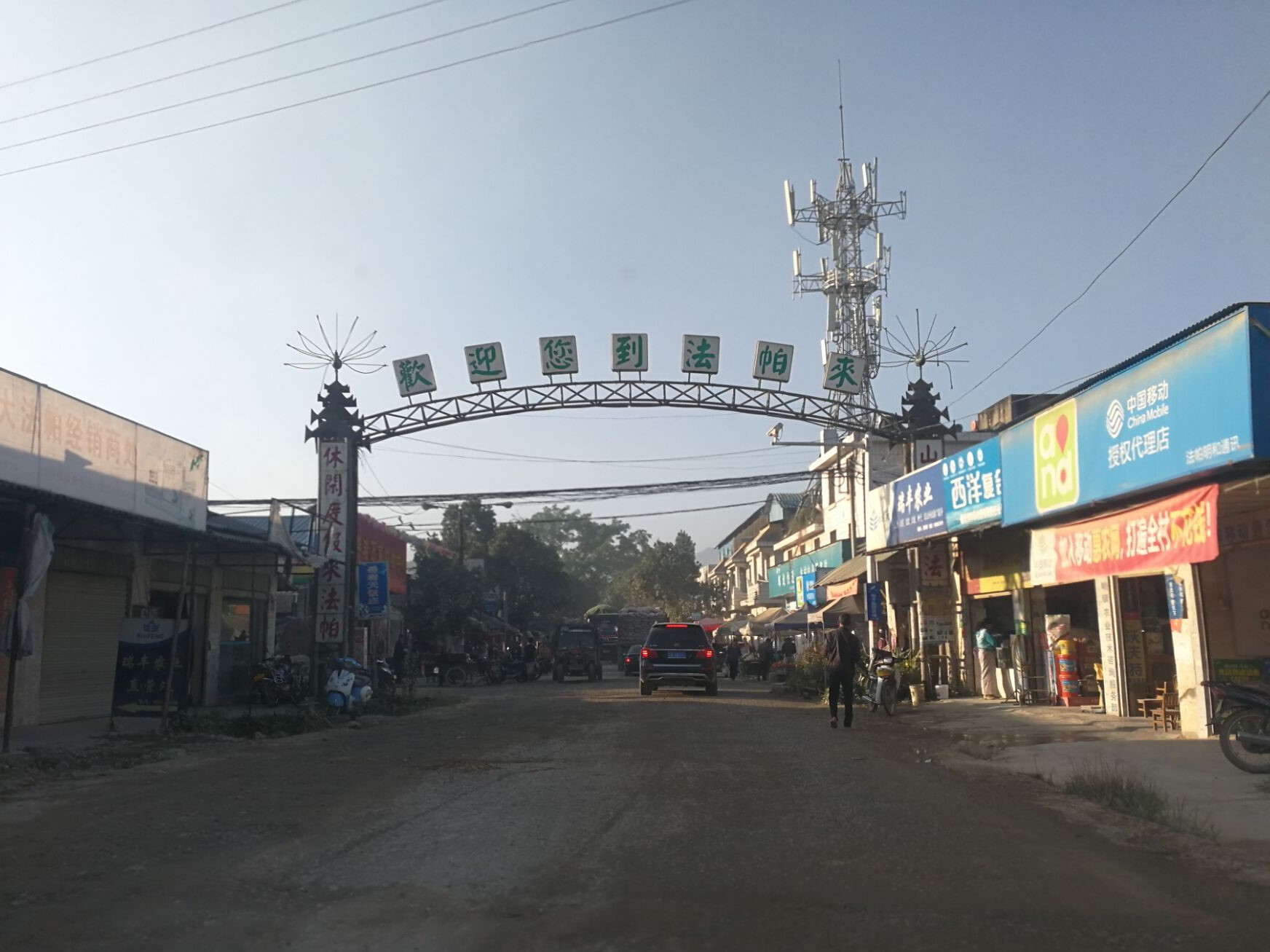 中文（中国大陆）: 芒市风平镇法帕村的街道